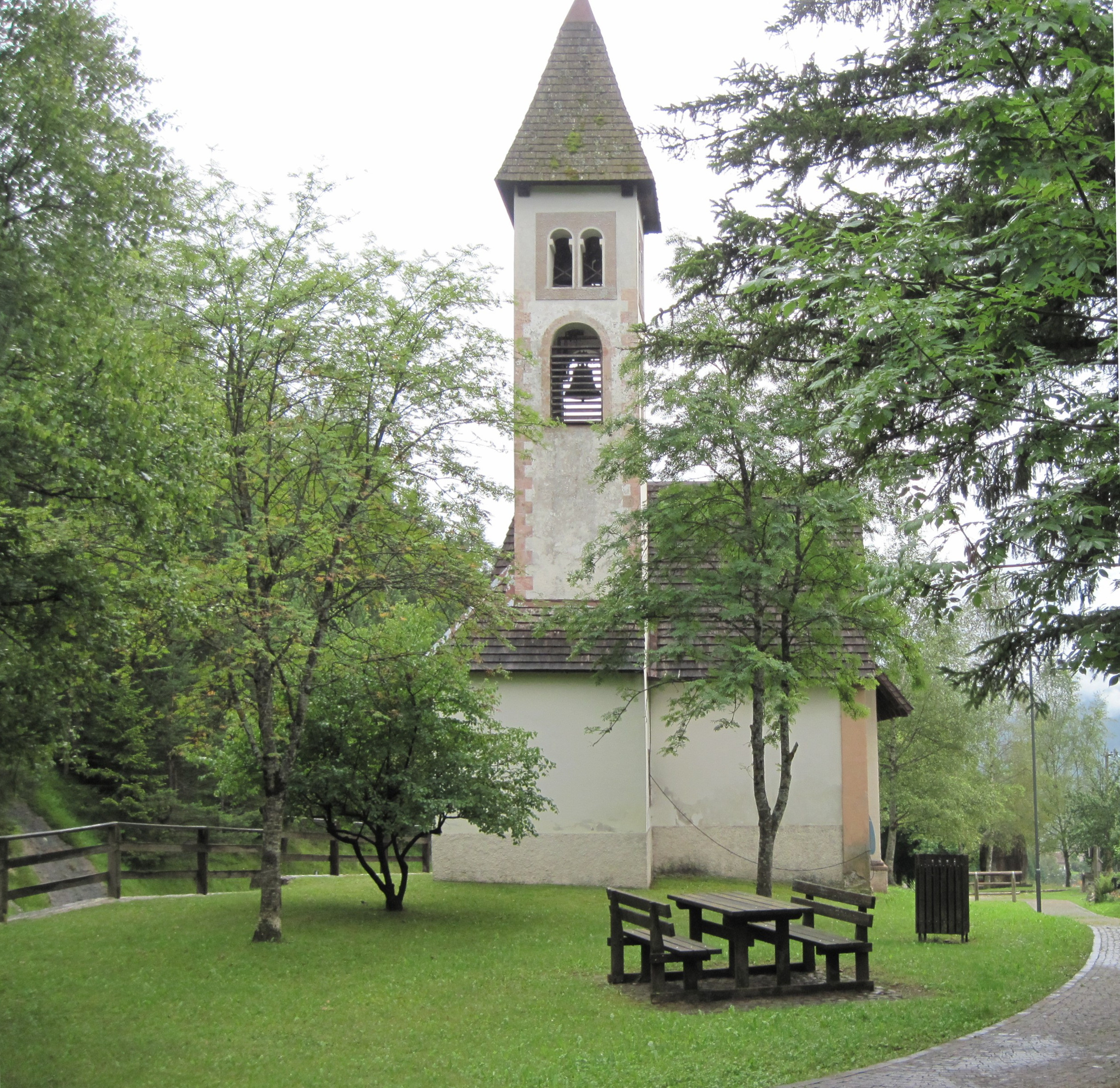 Chiesa dell'Addolorata, lungo la strada che unisce Tesero a Stava. Poco sopra questo luogo, il 19 luglio 1985, i bacini di decantazione della miniera di Prestavel ruppero gli argini investendo l'abitato di Stava e provocando la morte di 268 persone. La massa di acqua, fango e detriti sfiorò la piccola chiesa.